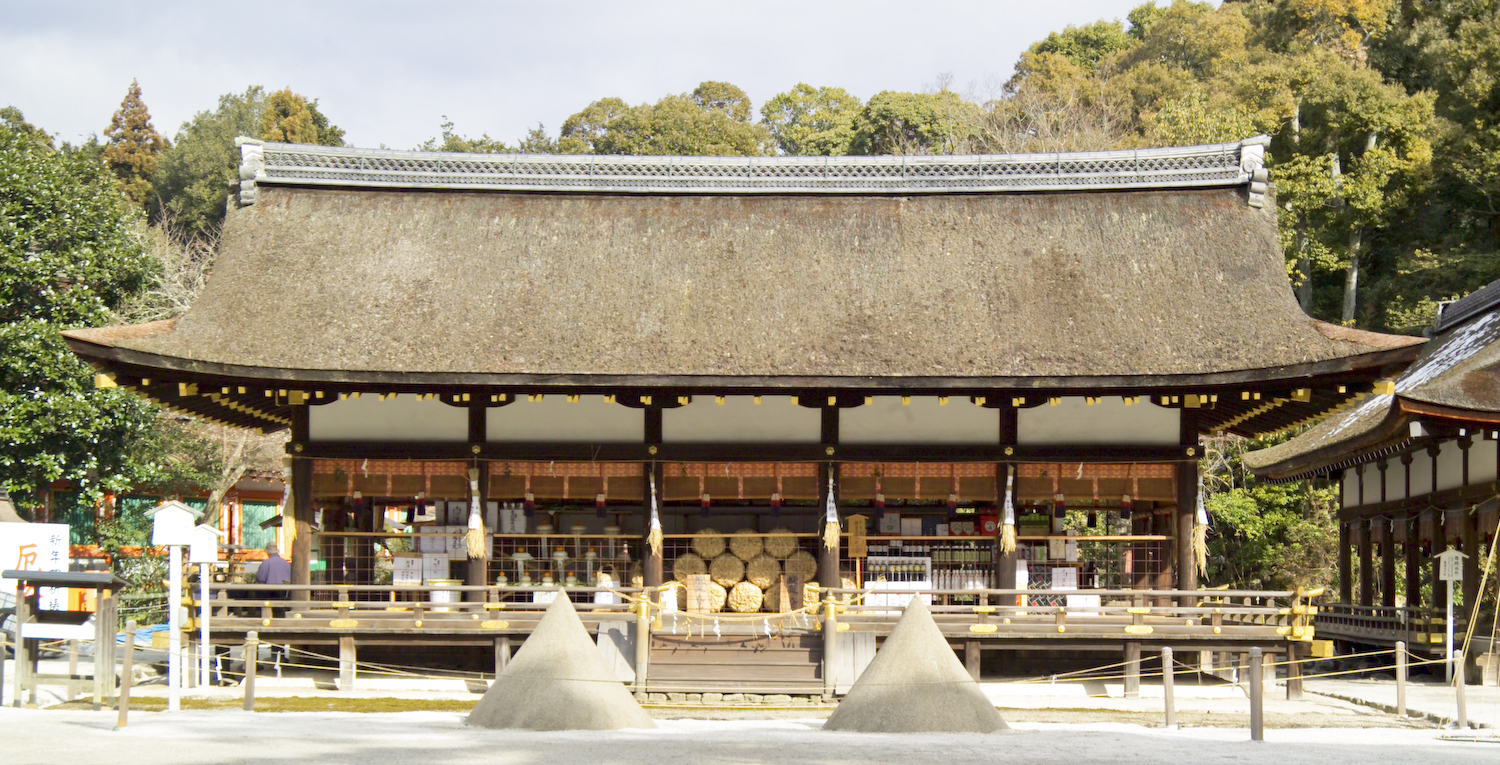 This photograph was taken at the Kamigamo Shrine, formally Kamowakeikazuchi Shrine (賀茂別雷神社, kamowakeikazuchi jinja) in Kyoto (京都), Japan.